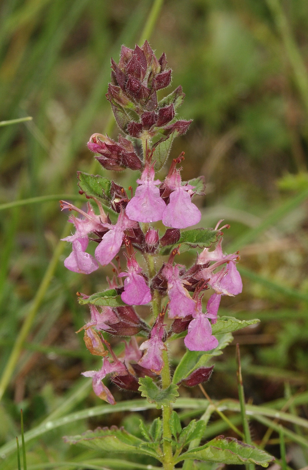 Teucrium chamaedrys, Schwäbische Alb, Germany